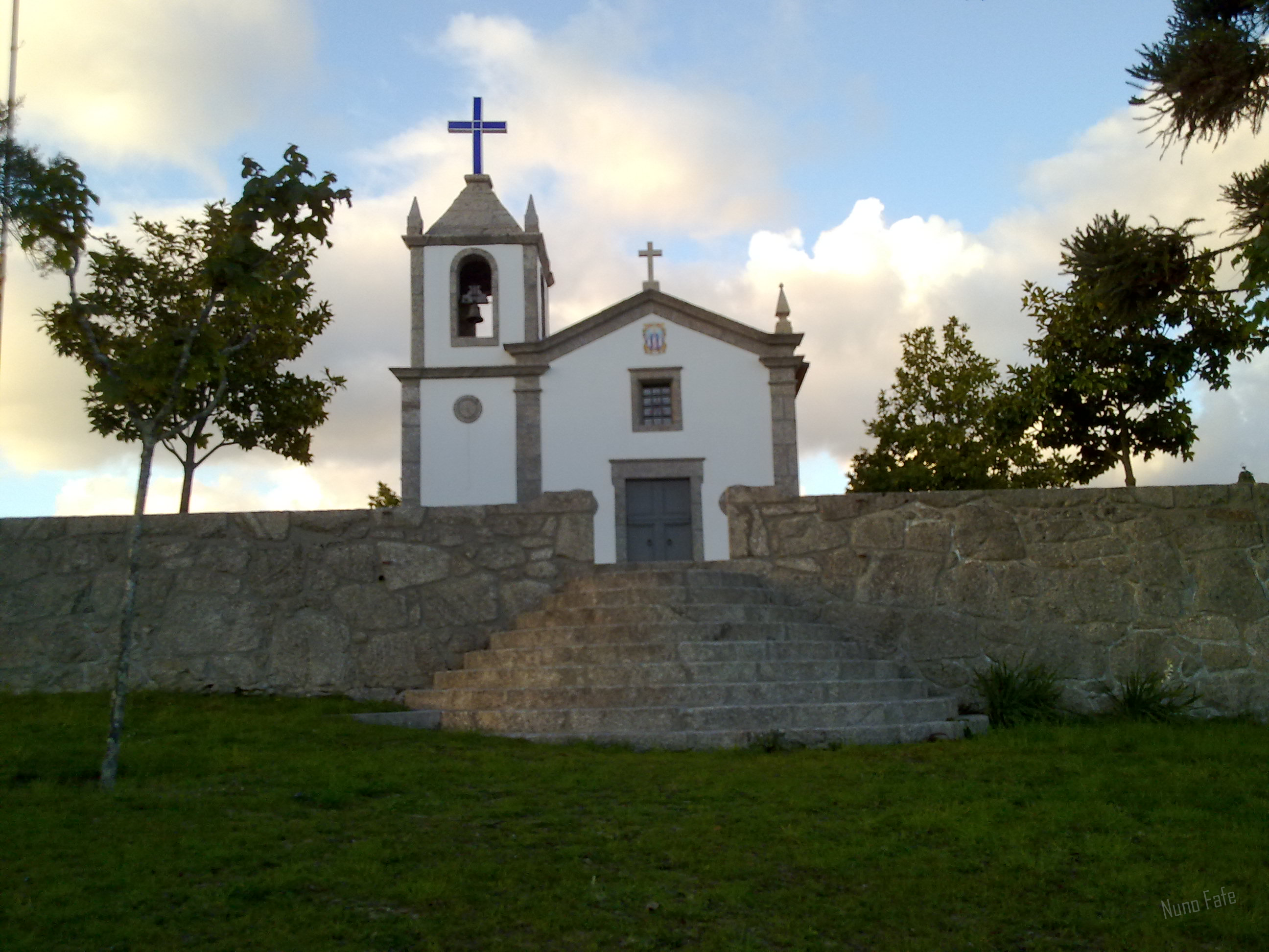 Santuário de Nª Sª das Graças, no lugar do Outeiro das Cruzes em Travassós Fafe